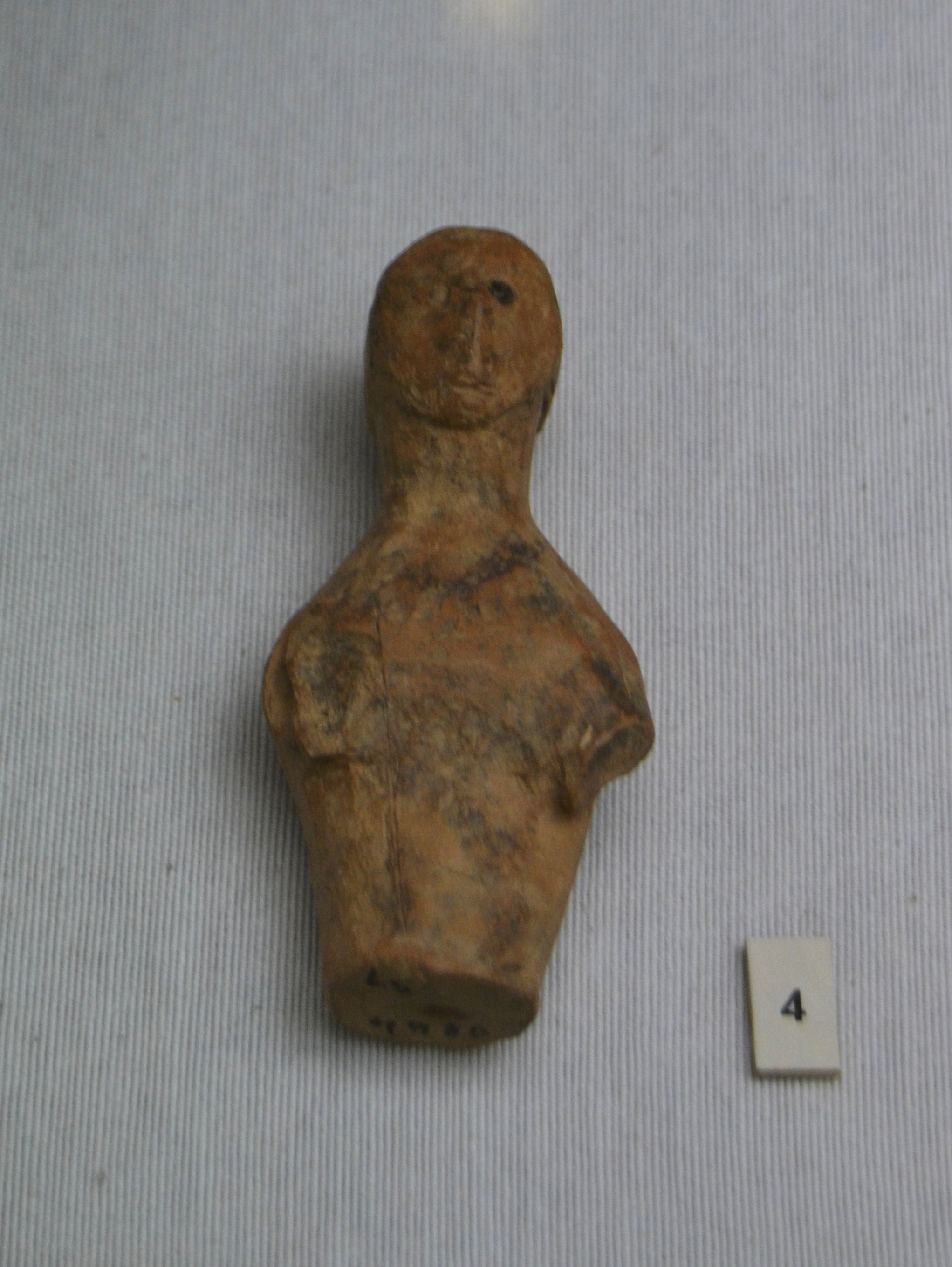 Figureta femenina de terra cuita, La Seña (Villar del Arzobispo), Museu de Prehistòria de València.